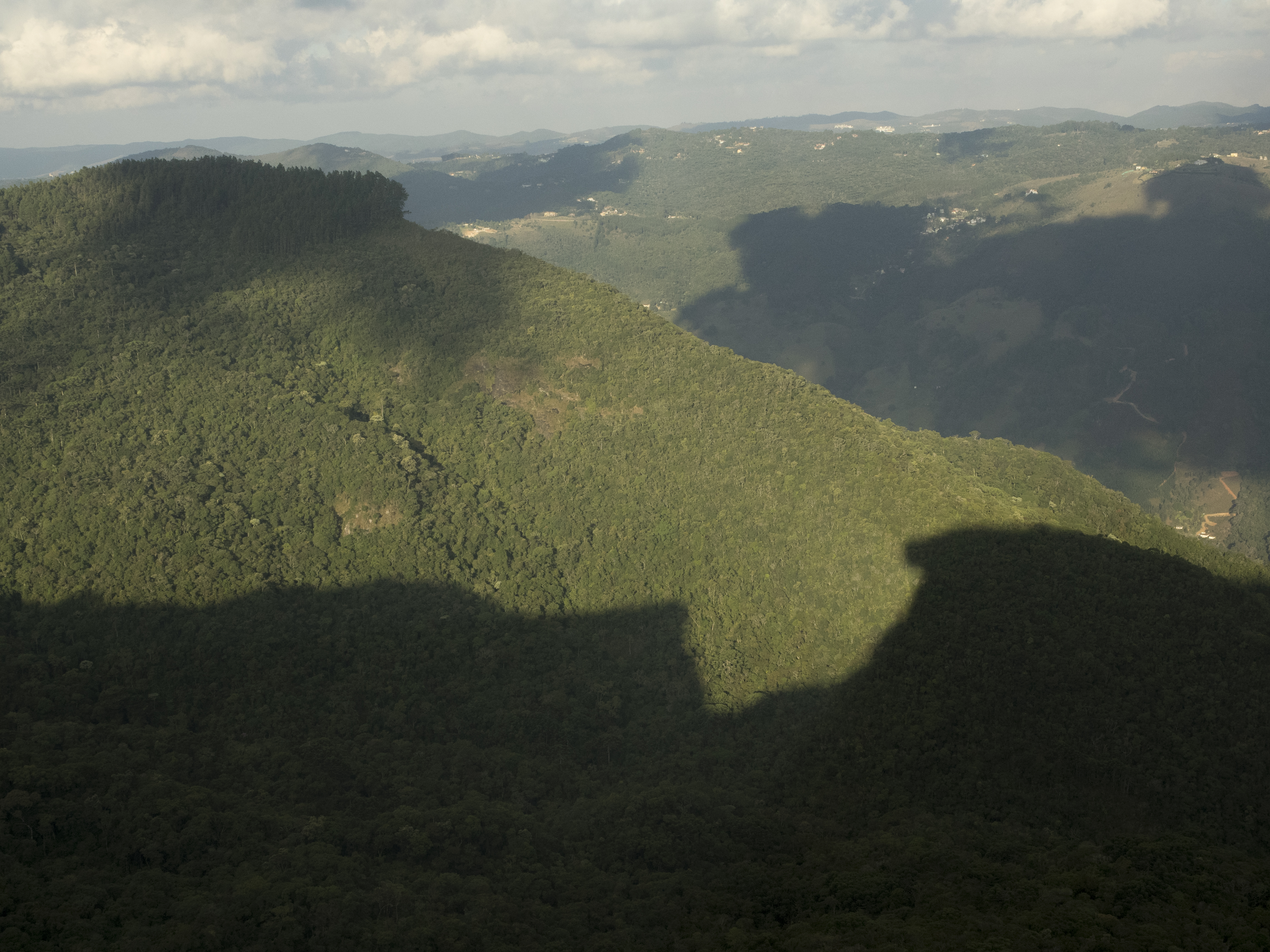 Pedra do Baú